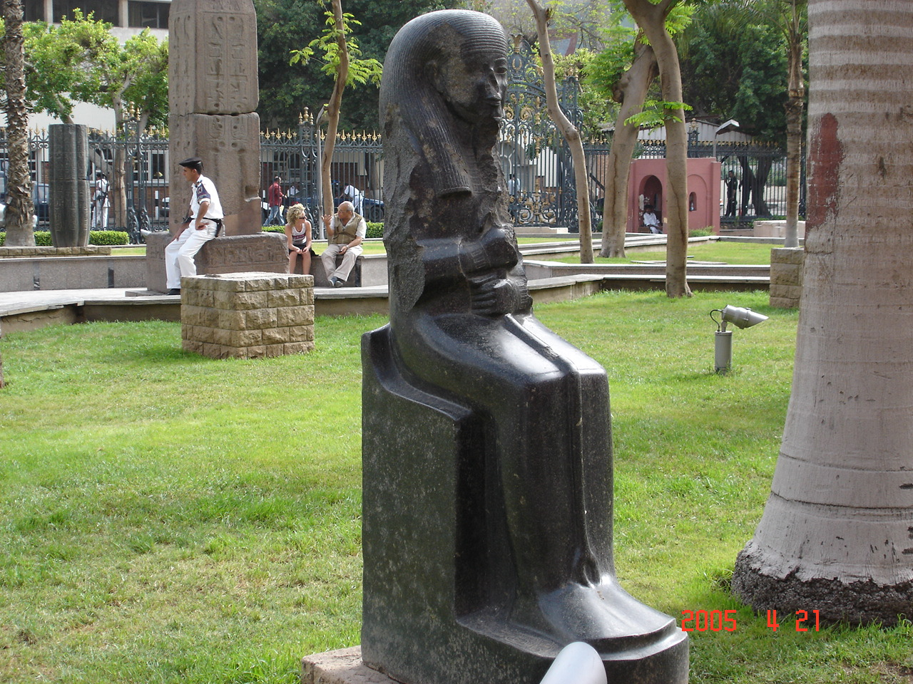 Ülőszobor a parkban (Egyiptom, Kairó, Tahrír tér, Múzeum kert)